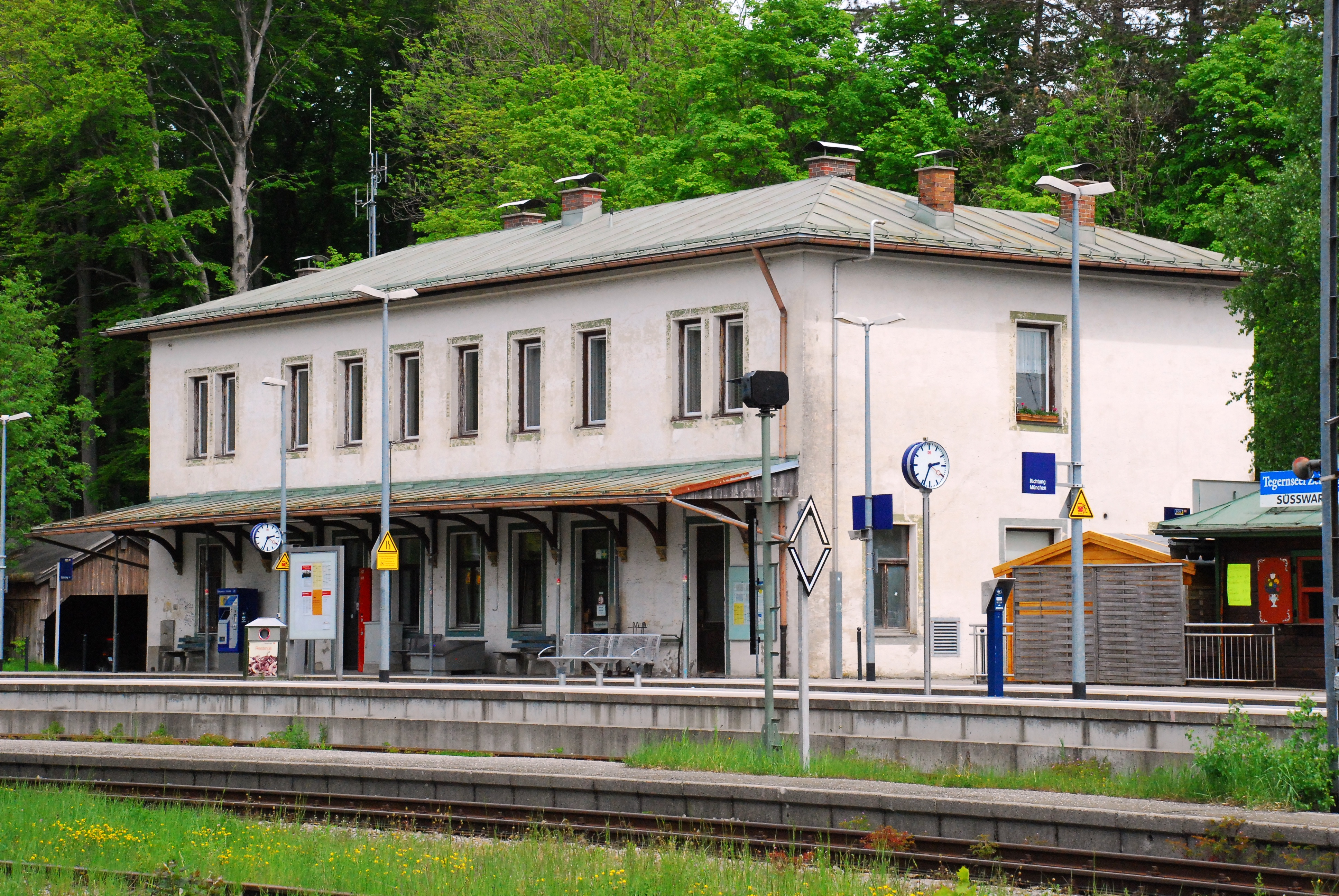 Bahnhofsgebäude von Schaftlach, Gemeinde Waakirchen, Landkreis Miesbach, Regierungsbezirk Oberbayern, Bayern. Trennungsbahnhof für die Bahnstrecken der Bayerischen Oberlandbahn von Holzkirchen nach Lenggries und nach Tegernsee.